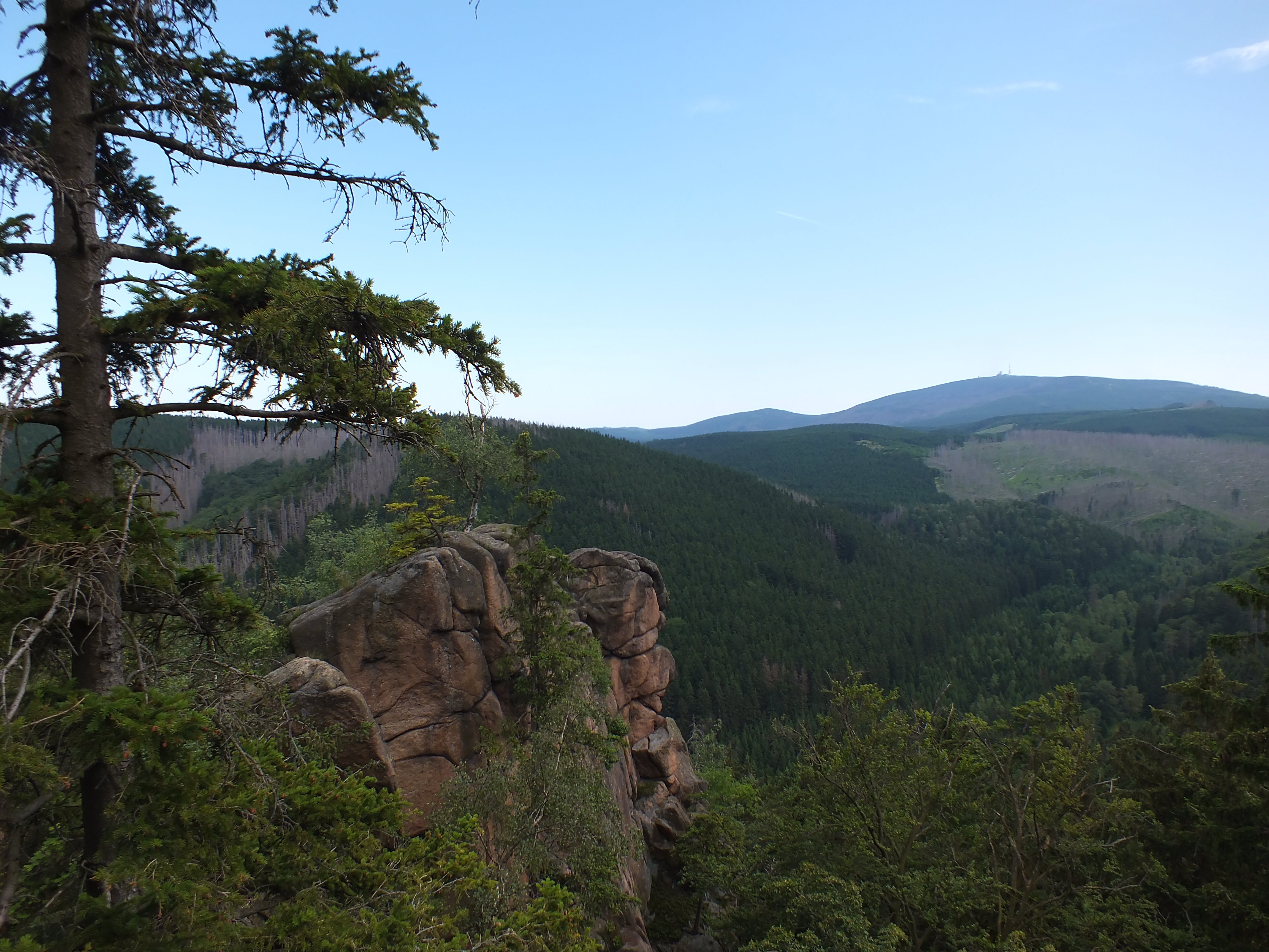 Blick von der Rabenklippe zum Brocken